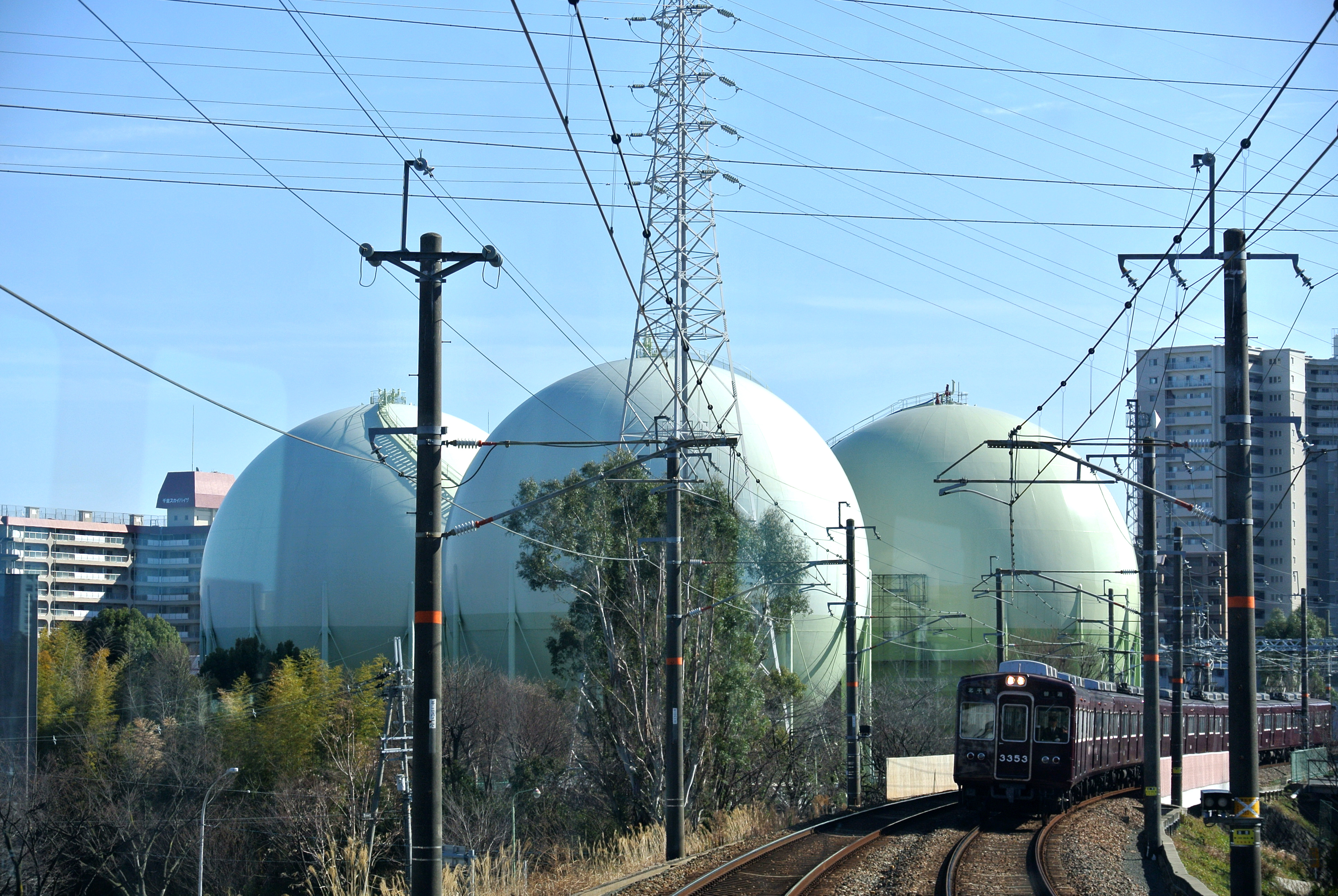 Mar 11, 2013 at 15:04, Osaka 吹田